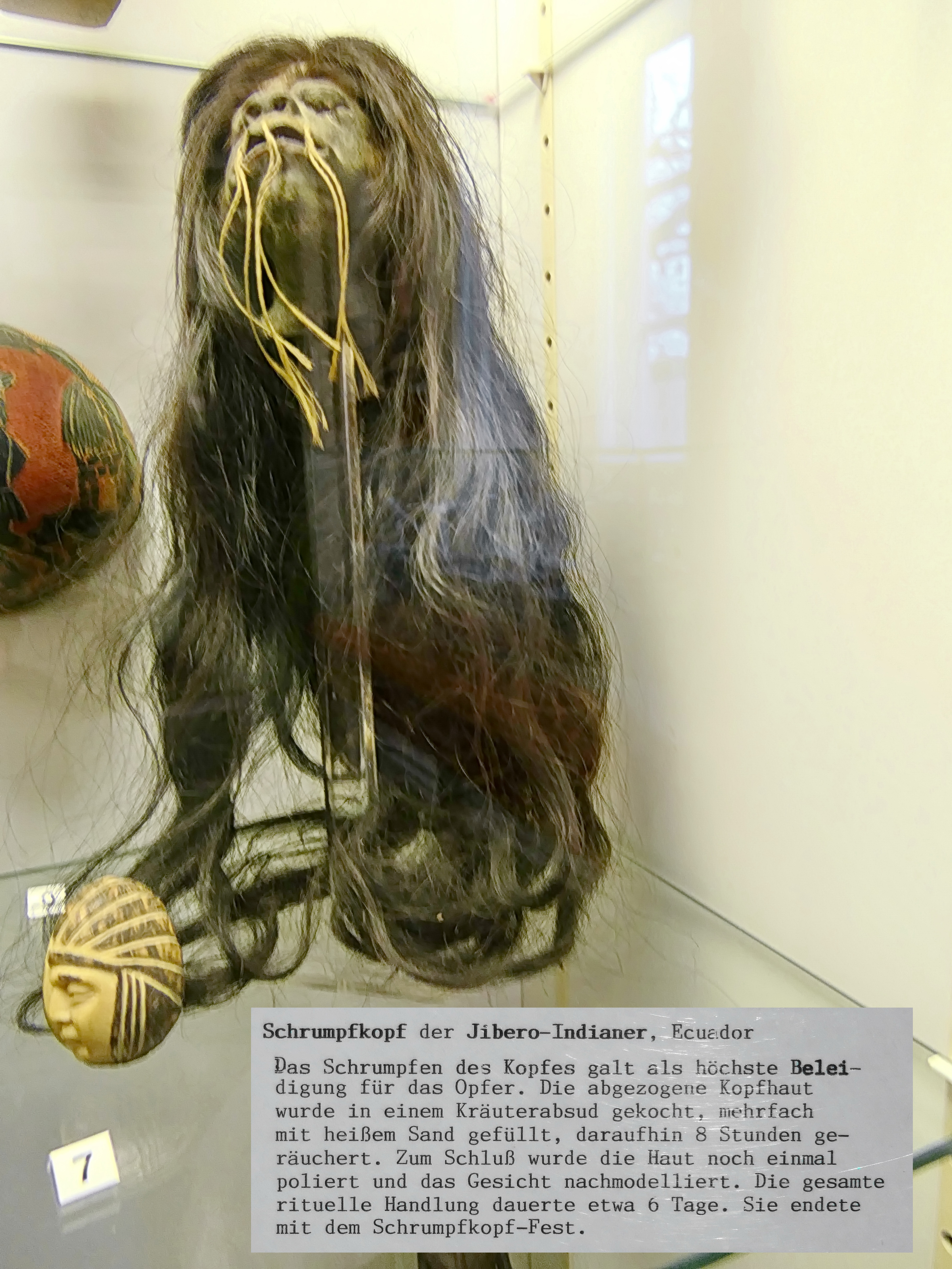 Dieser Schrumpfkopf (shrunken head) aus Ecuador befand sich bis Anfang 2018 im Heimatmuseum Schloss Schönebeck (Bremen) und wurde im Februar gestohlen. Er wurde einst von einem Seemann mit nach Bremen gebracht.